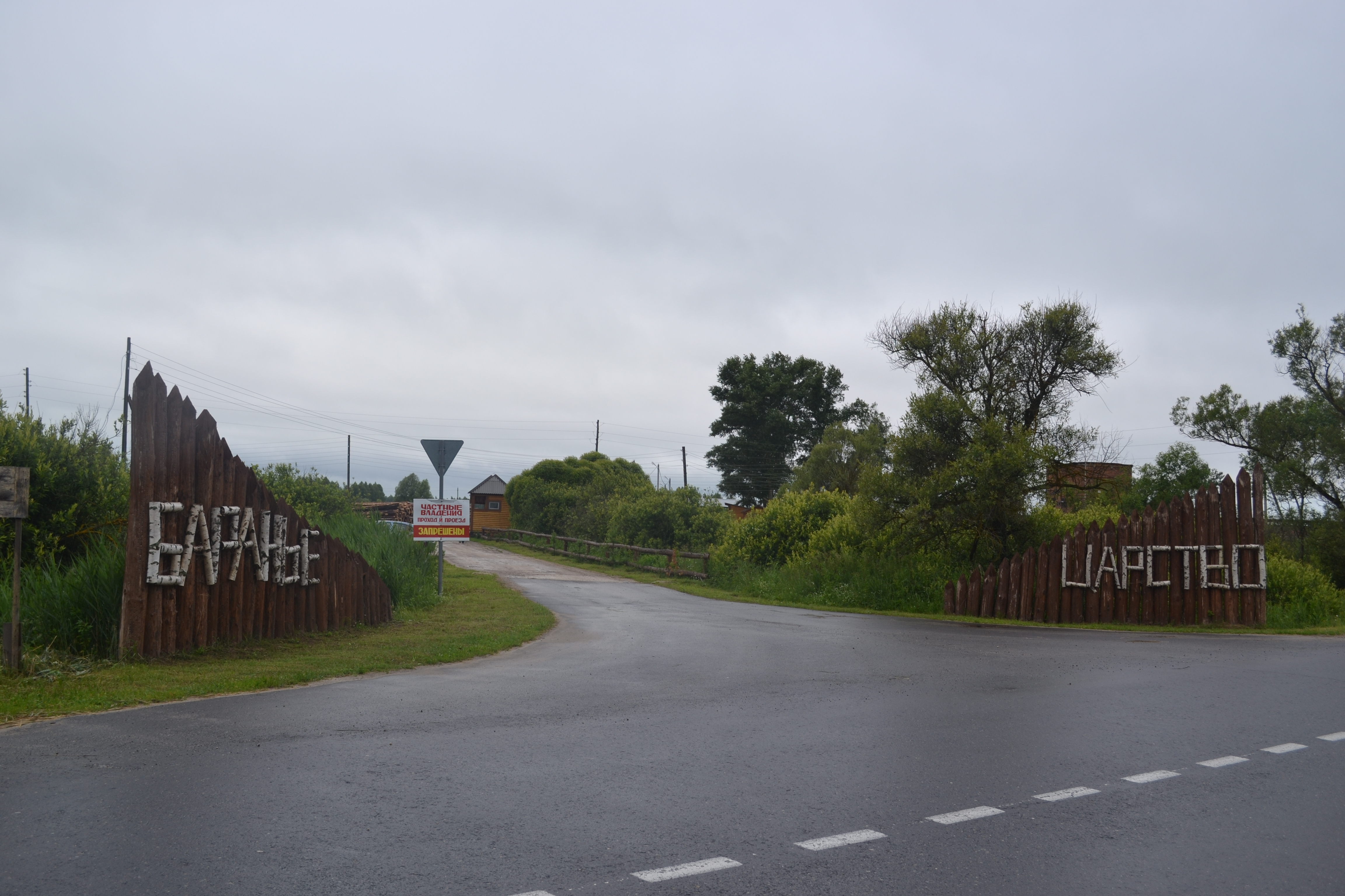 Баранье царство (Маврино, Шатурский район)